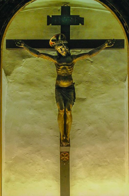 Il crocefisso miracoloso intagliato nell'olmo fiorito al passaggio di san Zanobi